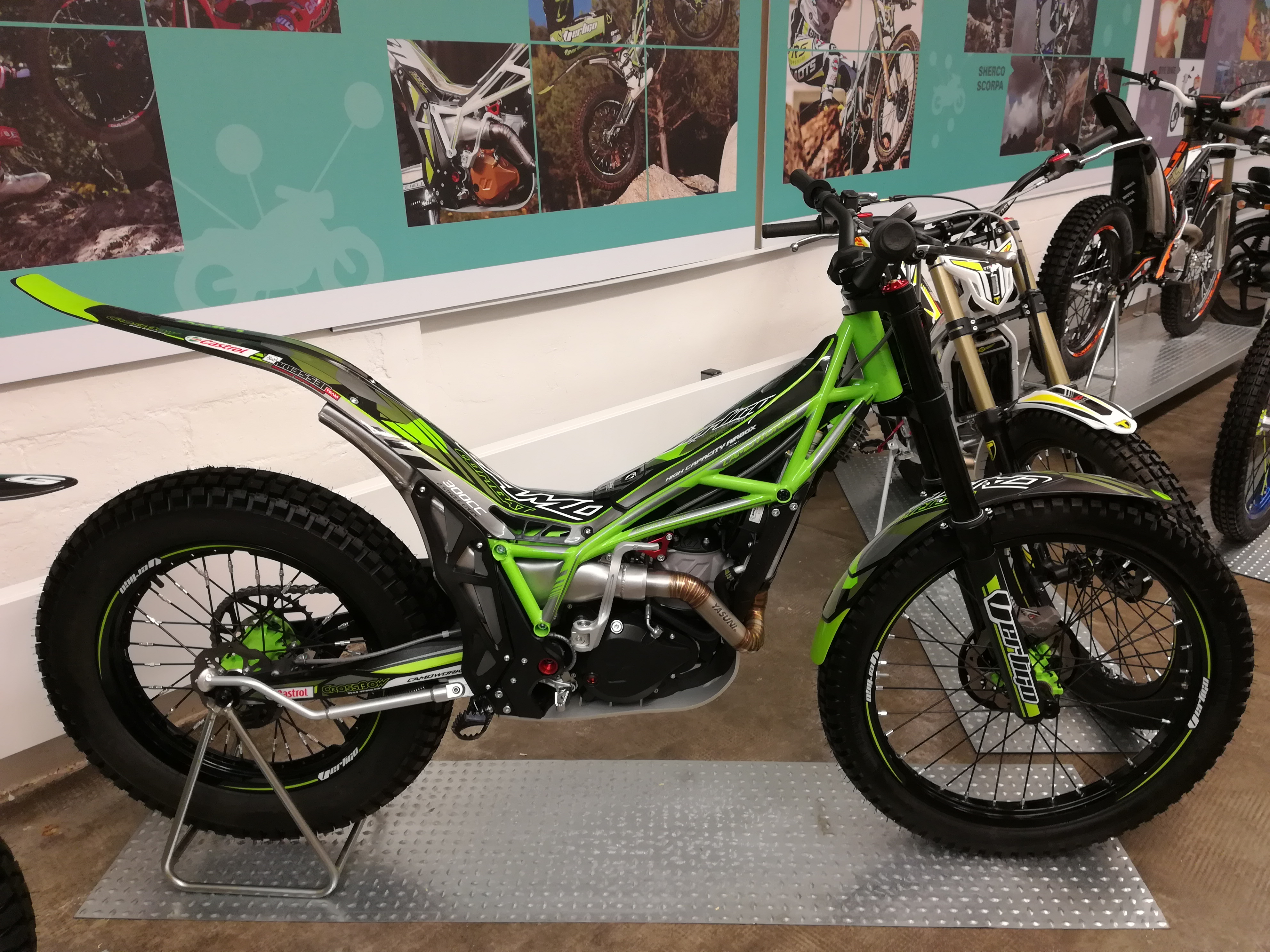 Vertigo Combat 300cc, 2017